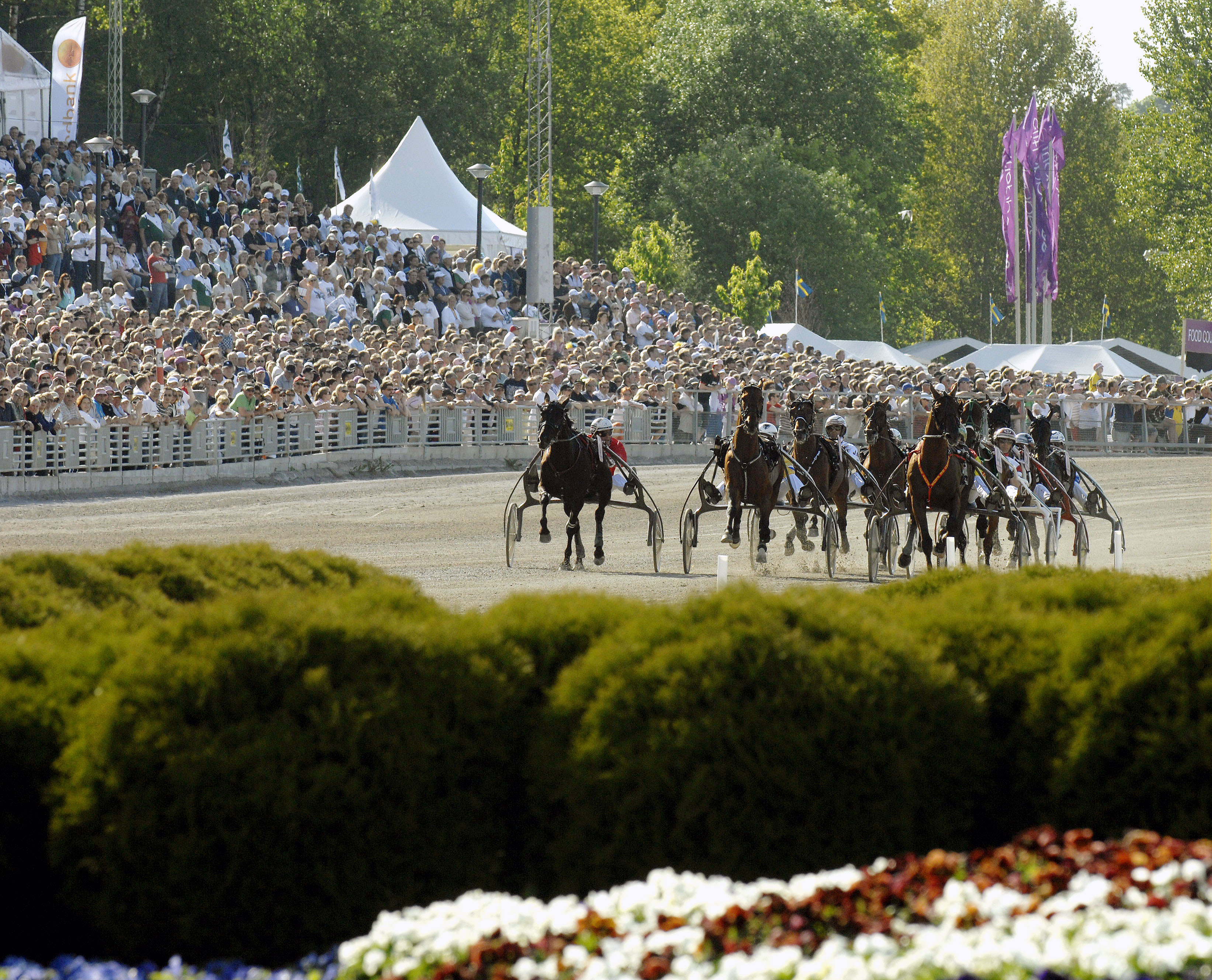 Elitloppet på Sovalla 2008.